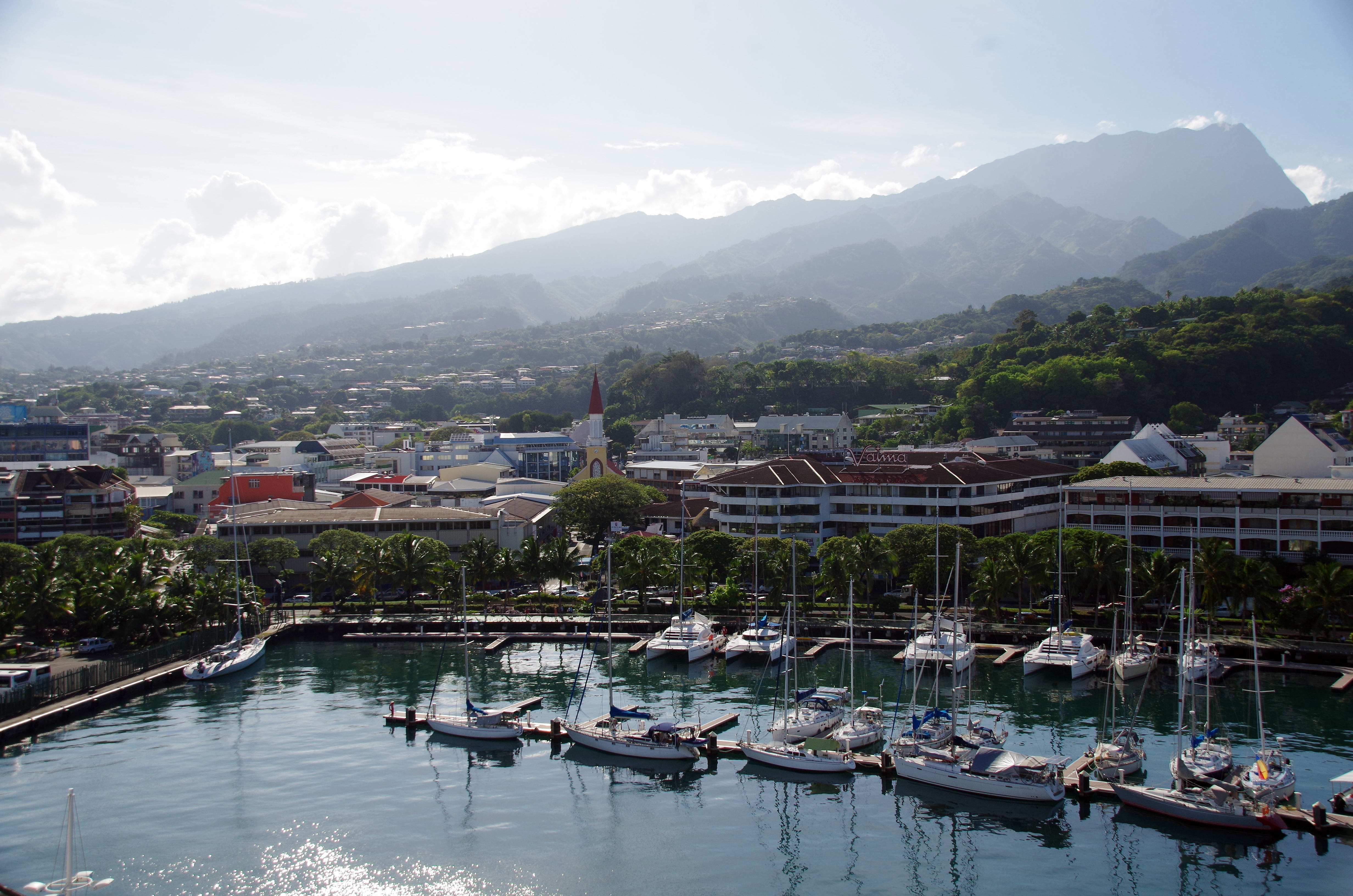 Papeete: Blick vom Hafen